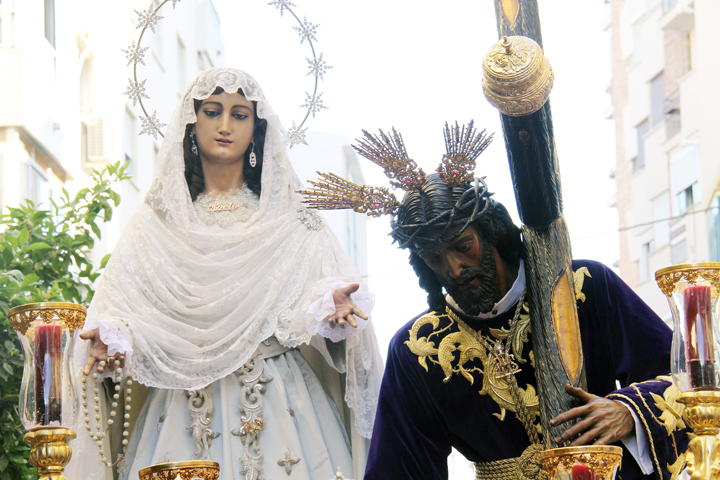 Los titulares de la cofradía del Rocío en su traslado.